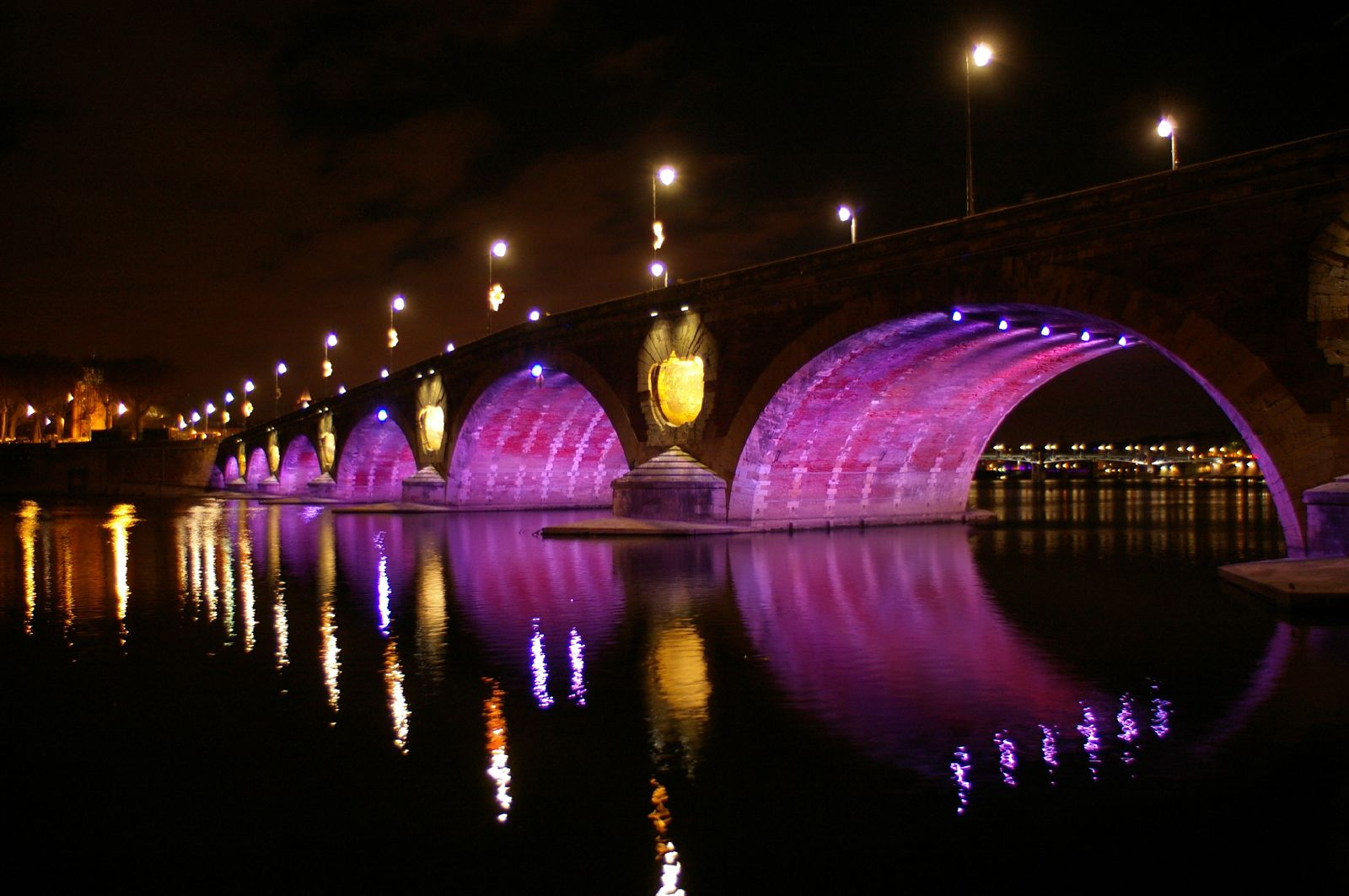 Couleurs de décembre sur le pont neuf de Toulouse. Colors de dicembre sul Pont nòu de Tolosa